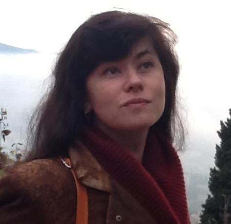 Марина Степнова